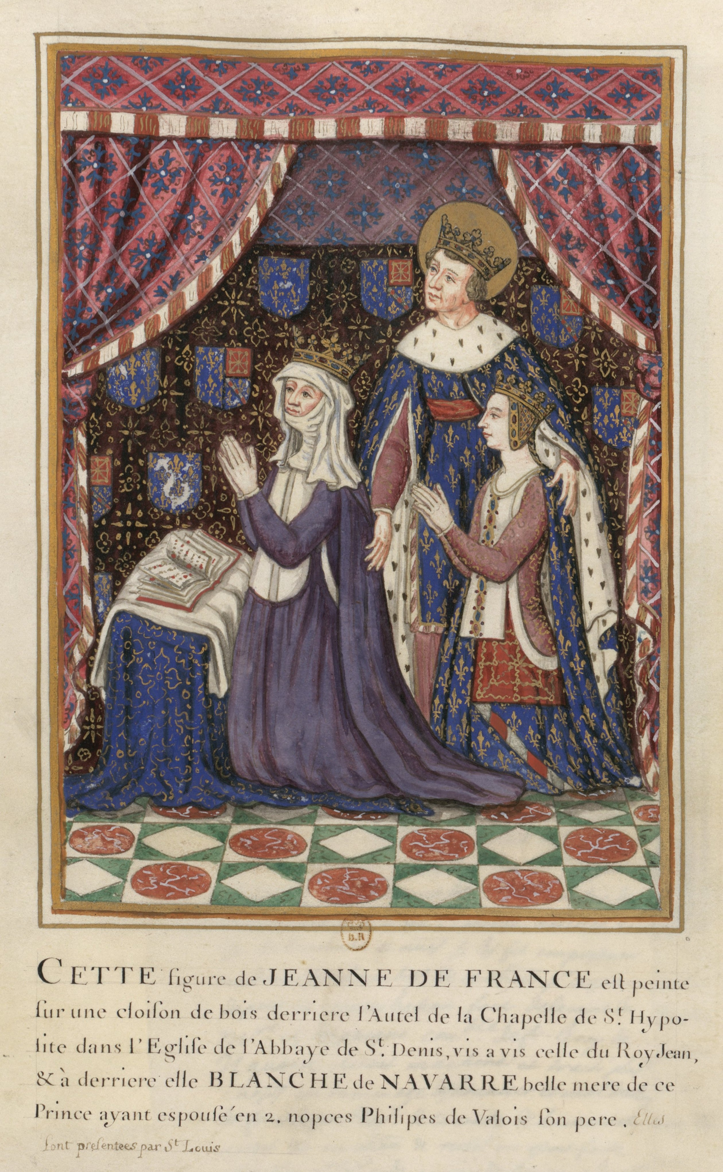 Jeanne de France (1351-1371) et Blanche of Navarre (1331–1398) et Philip VI of France